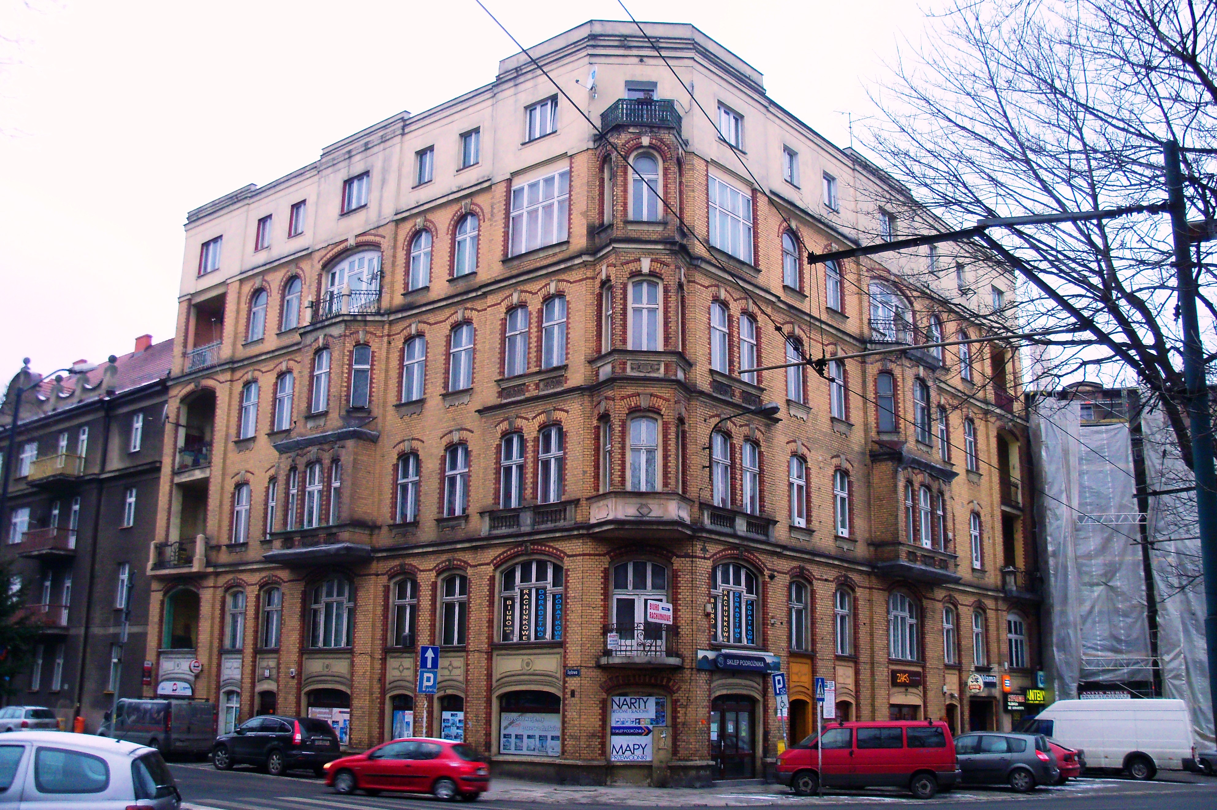 Katowice, pl. Wolności 9 / ul. Sądowa 2 - budynek narożny (zabytek nr A/1489/92 z 11.08.1992